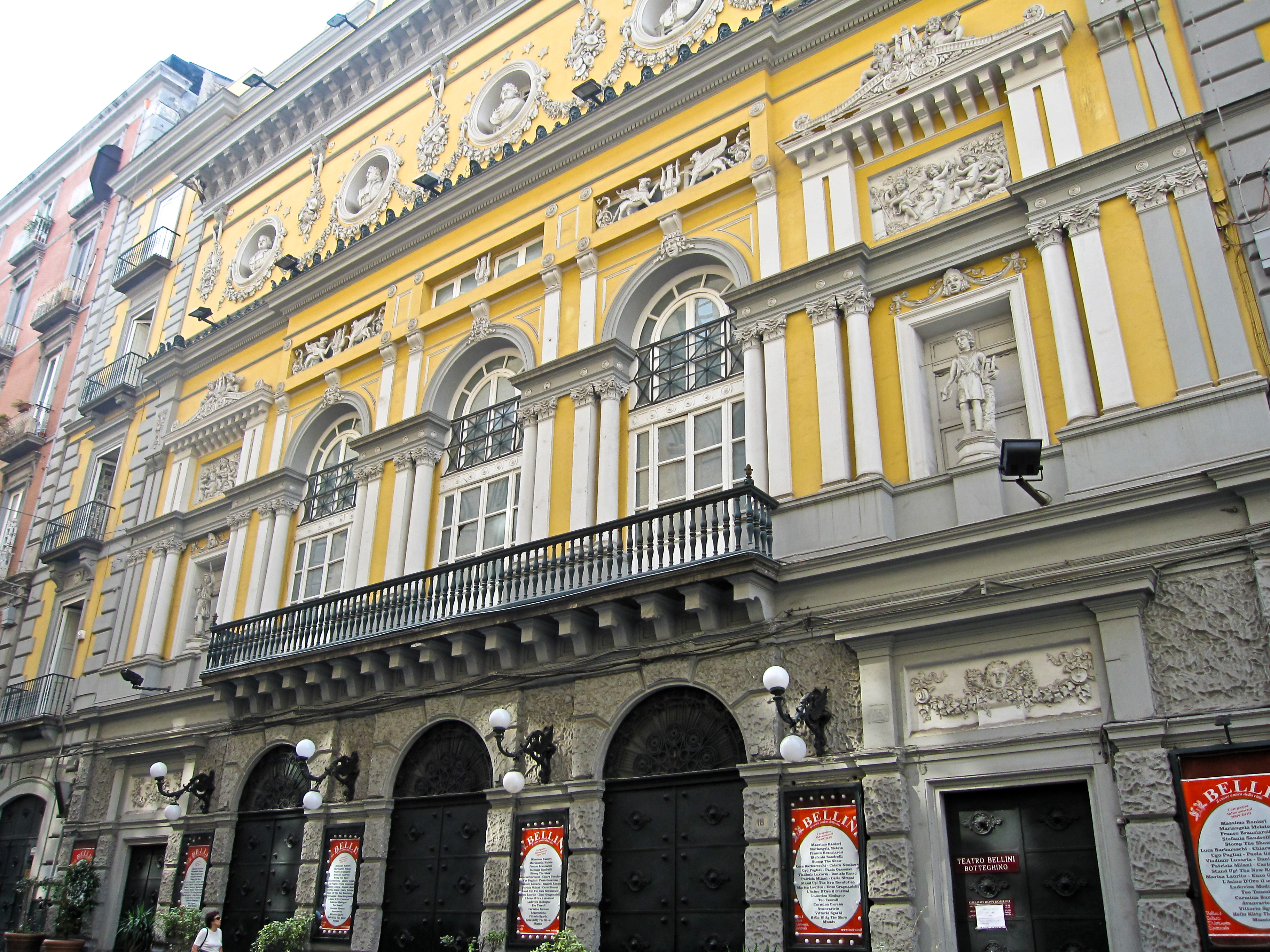 Parte della facciata del teatro Bellini (Napoli)